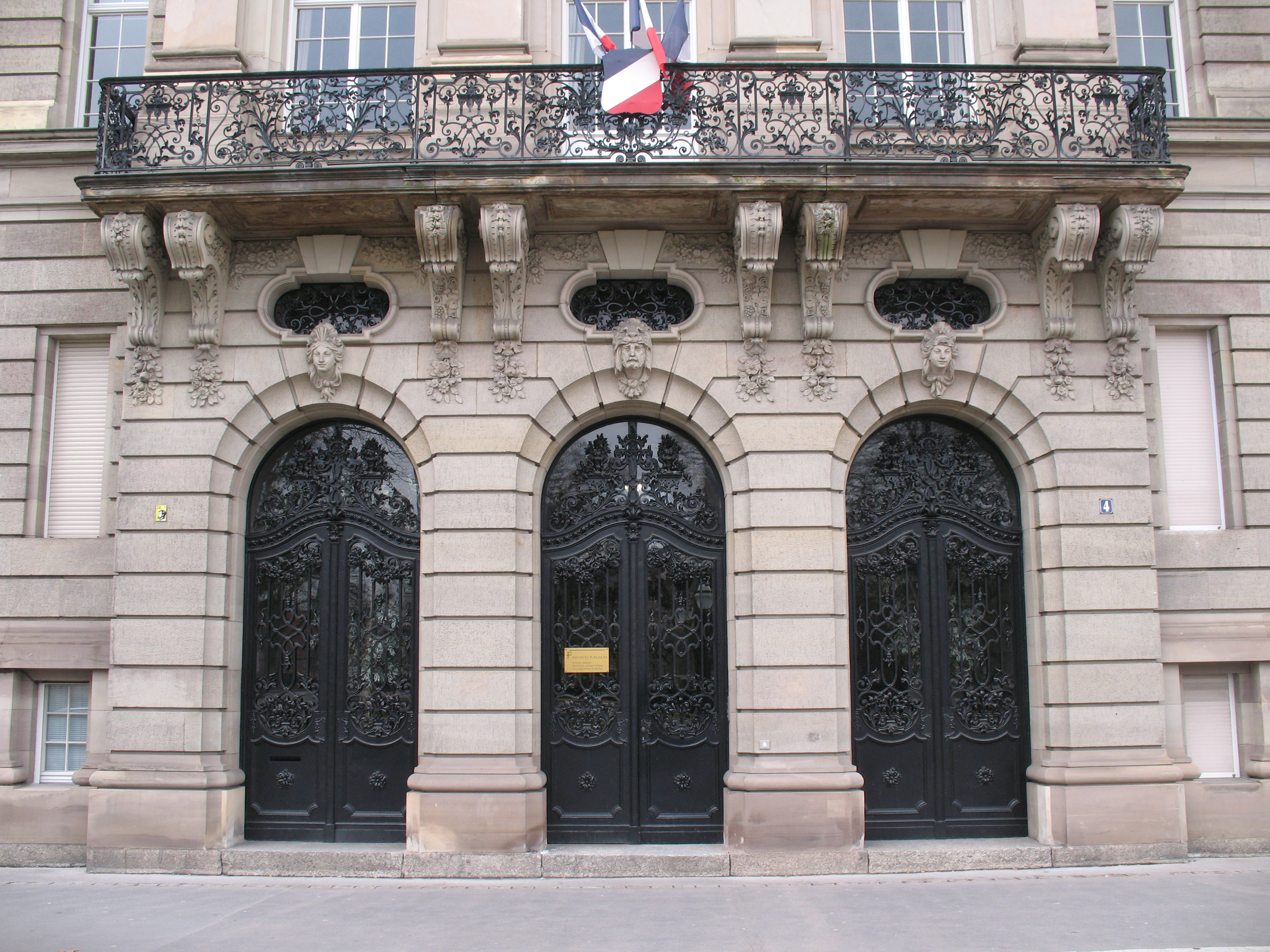 La plus grandiose des entrées pour le moins accueillant des hôtels !